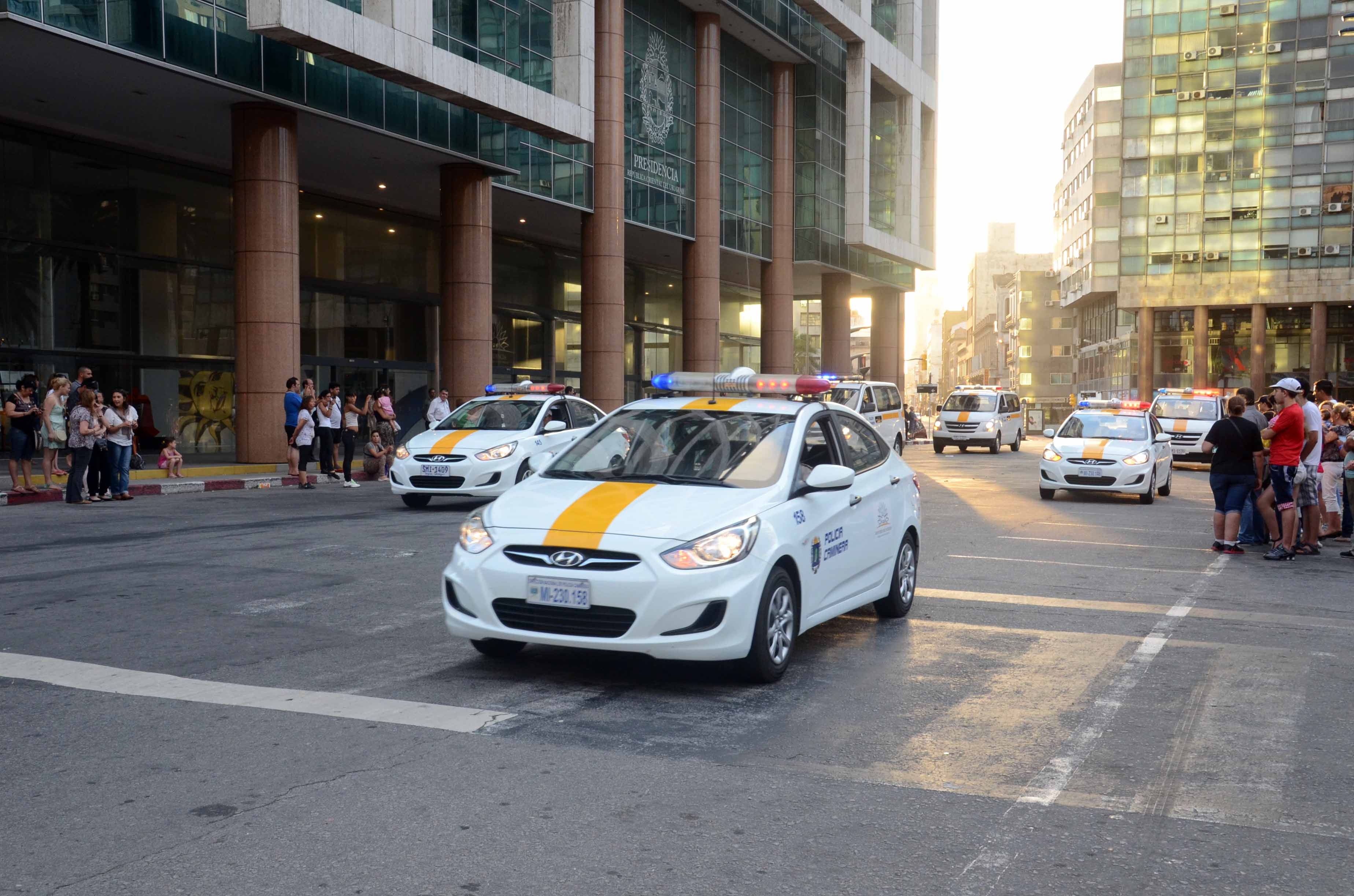 Día de la Policía Nacional (Uruguay) 18 diciembre 2013, actos protocolares y festejos realizados en Plaza Independencia, en Montevideo, frente al monumento del General José Gervacio Artigas.